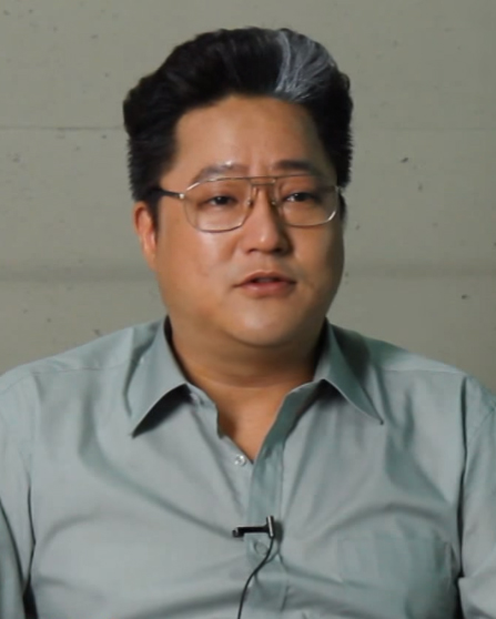 타짜-신의 손 배우 곽도원